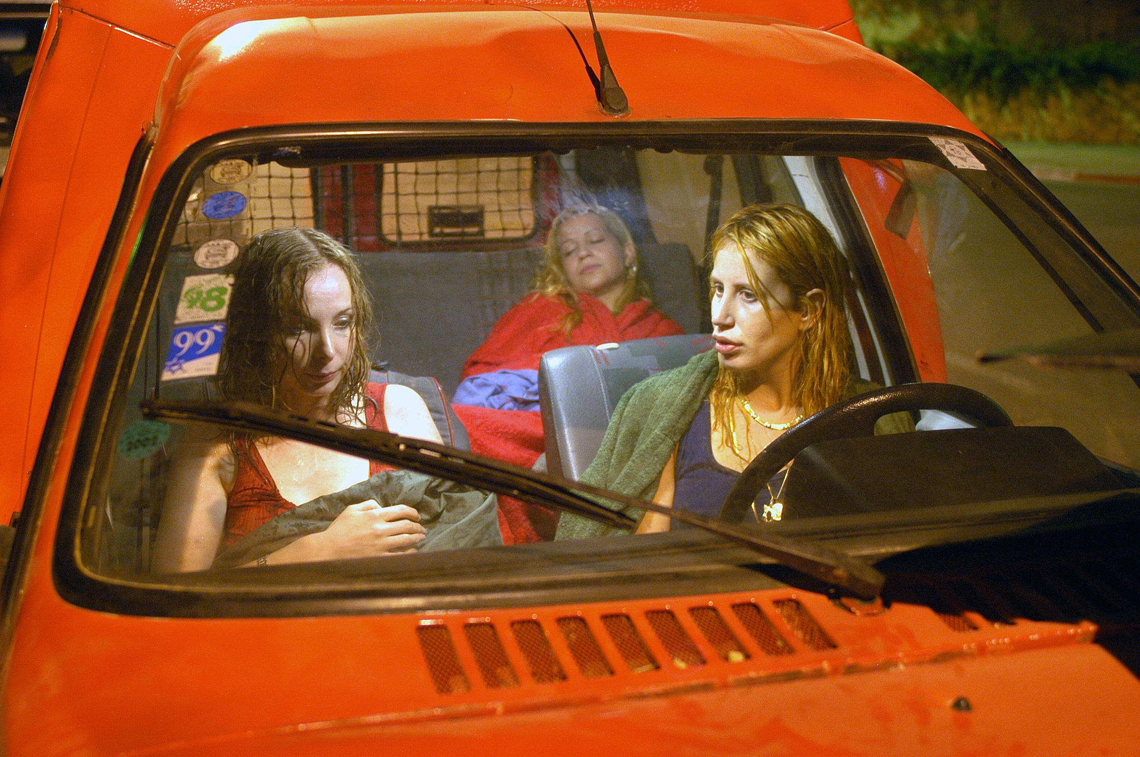 דורית בר אור ואוולין קפלון בסרטו של ינקול גולדווסר "אין לה אלוהים", 2006